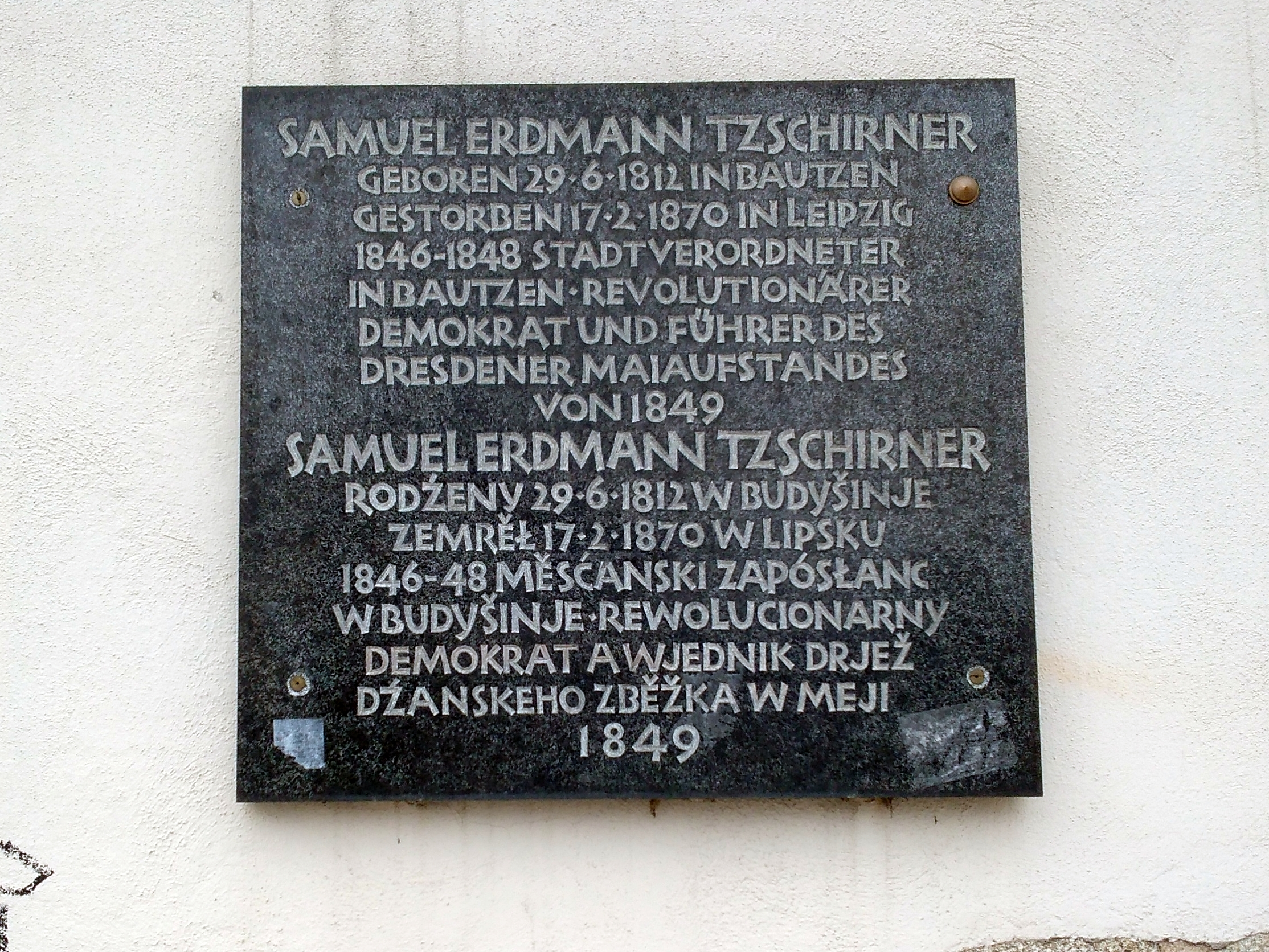 Hornjoserbsce: Wopomnjenska tafla za Samuela Erdmanna Tzschirnera při Tzschirnerowej w Budyšinje.